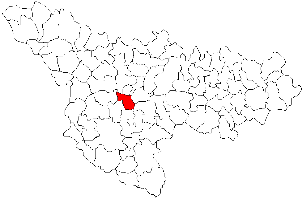 Categorie:Hărţi ale judeţului Timiş